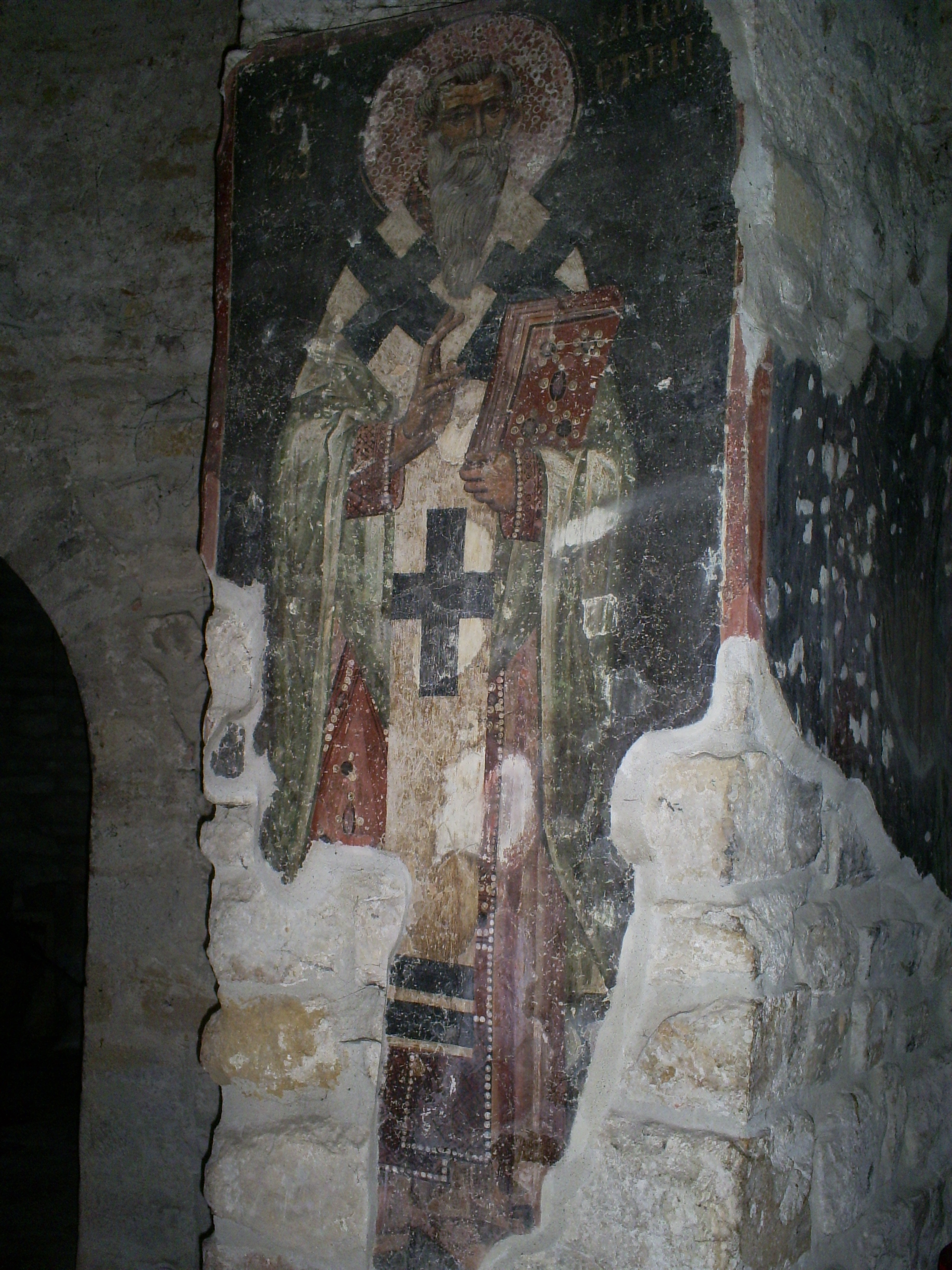 Petrova crkva - prolaz u galeriji